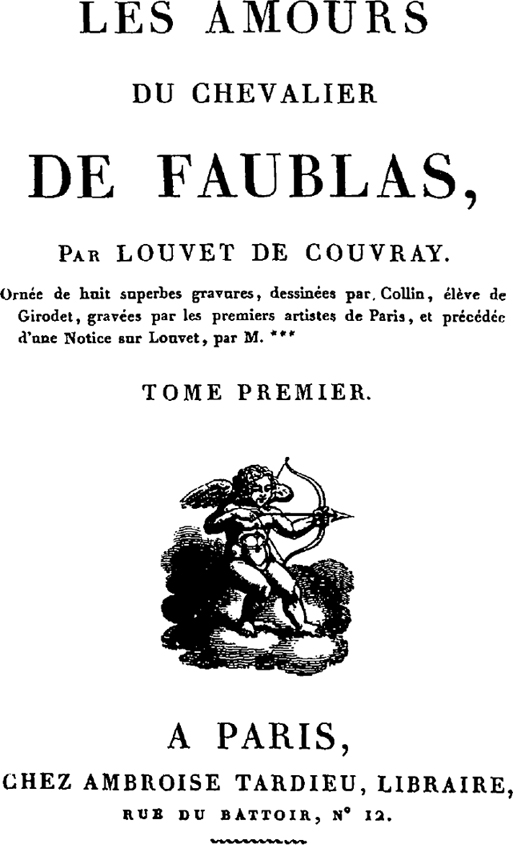 Front page of Les Amours du chevalier de Faublas by Jean-Baptiste Louvet de Couvrai (1760-1797)